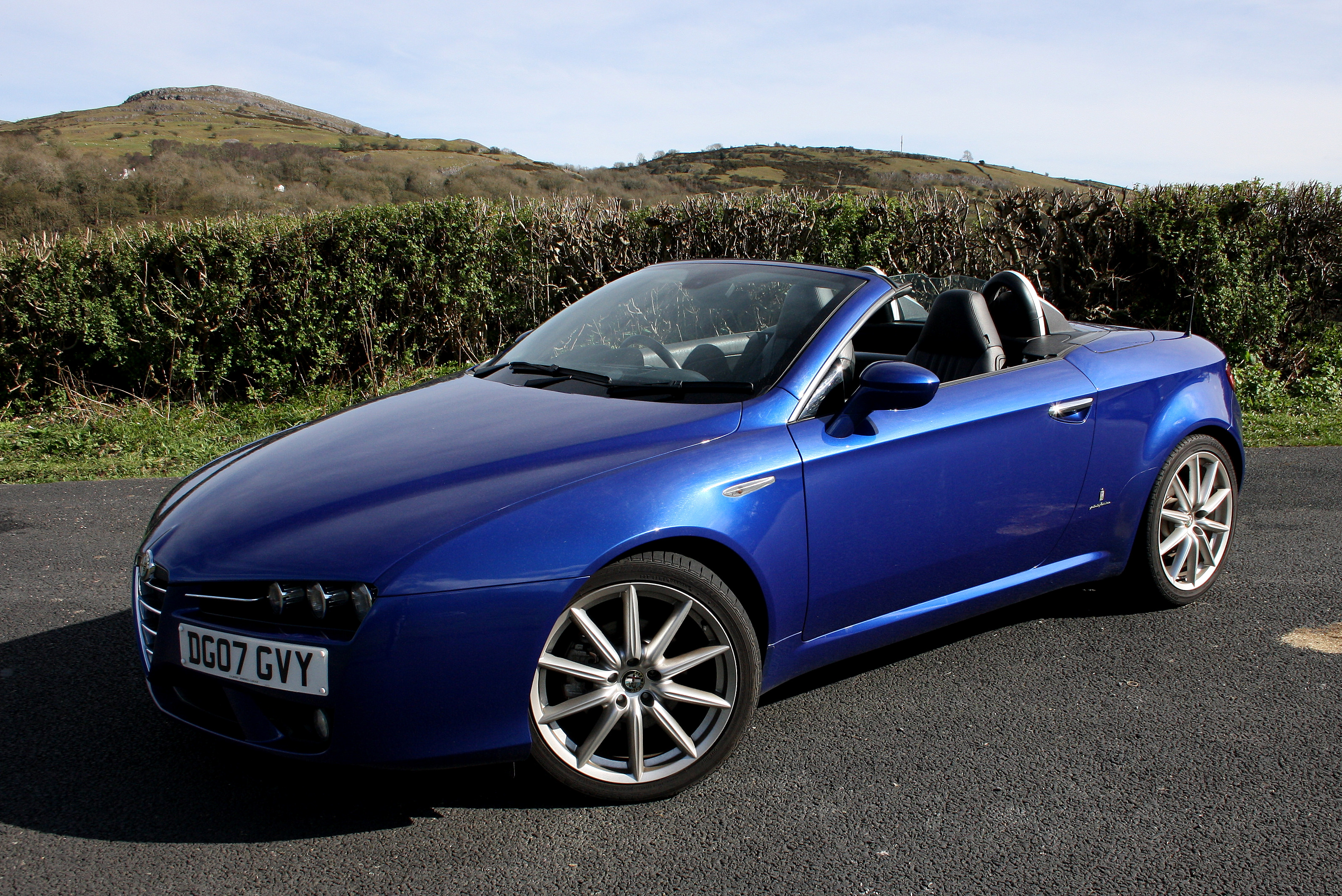 Alfa Romeo Spider